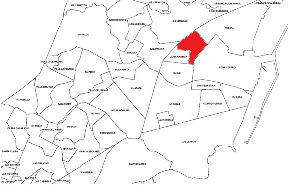 Localización del barrio